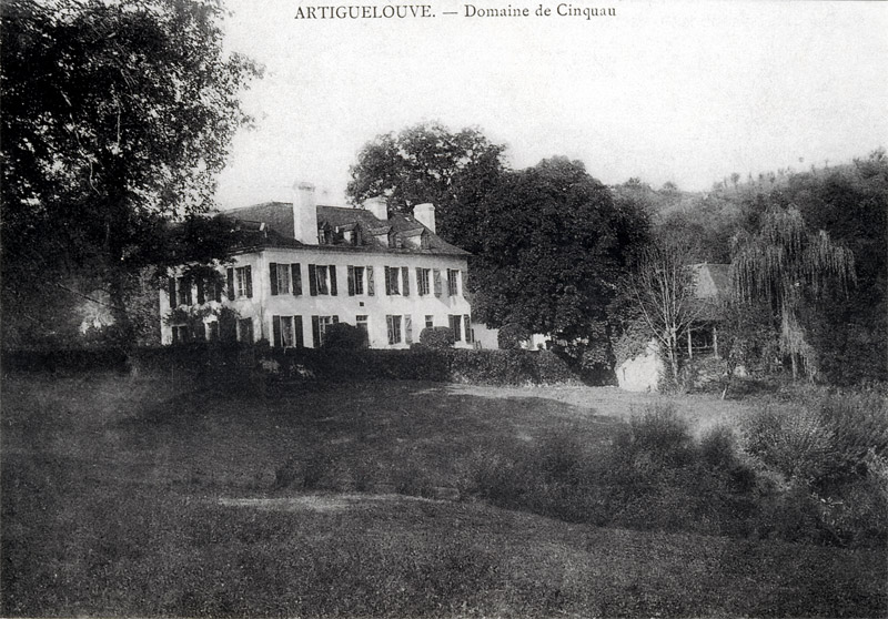 Le Domaine du Cinquau vers 1899